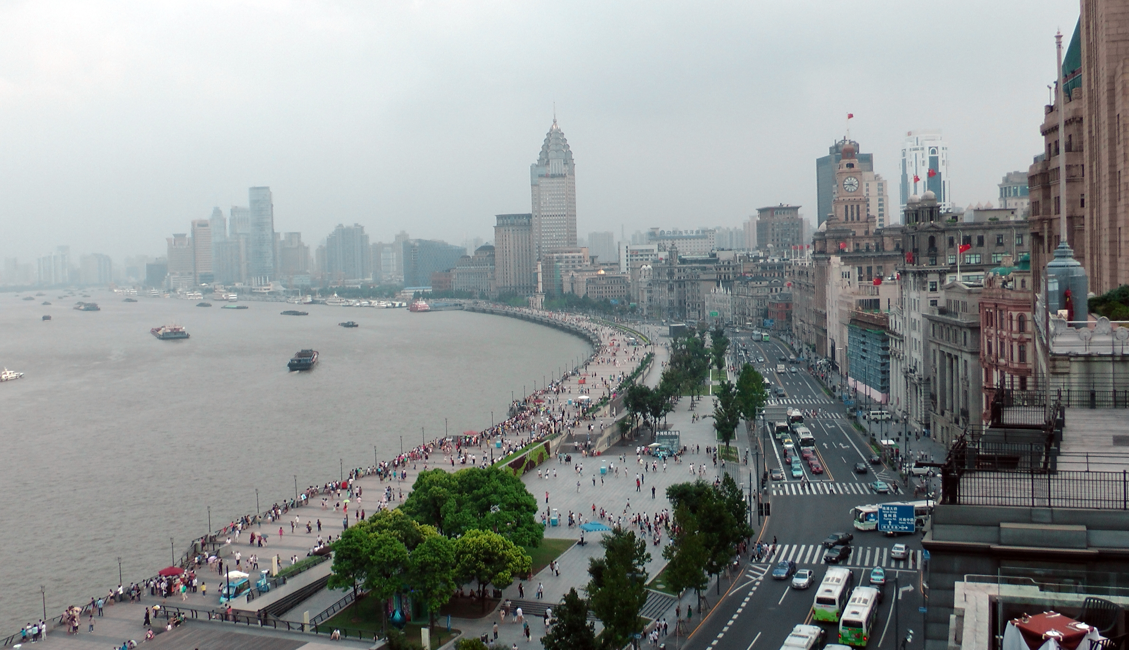 Shanghaï, vue sur le Bund.